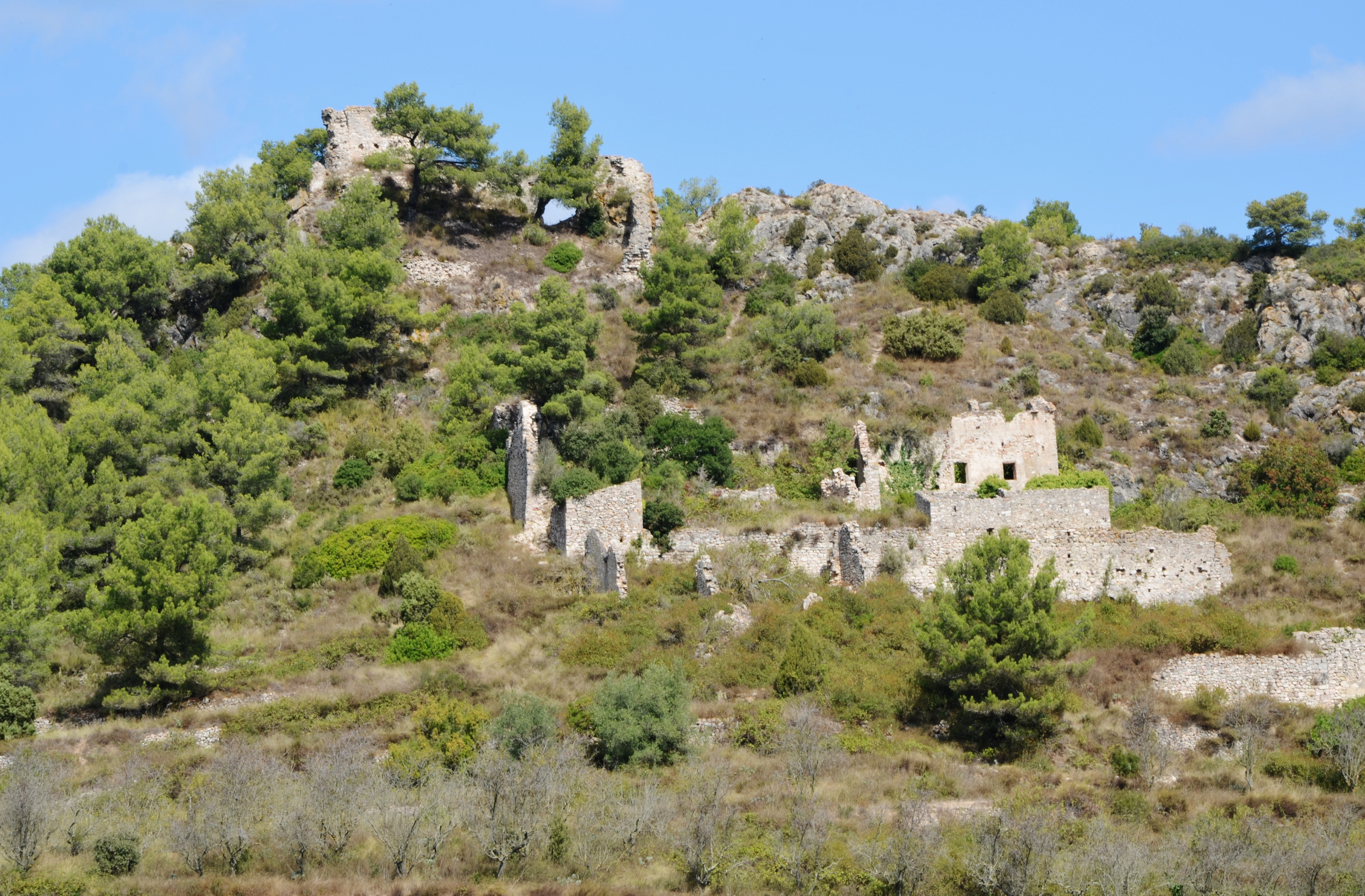 Castell de Selma (Aiguamúrcia)